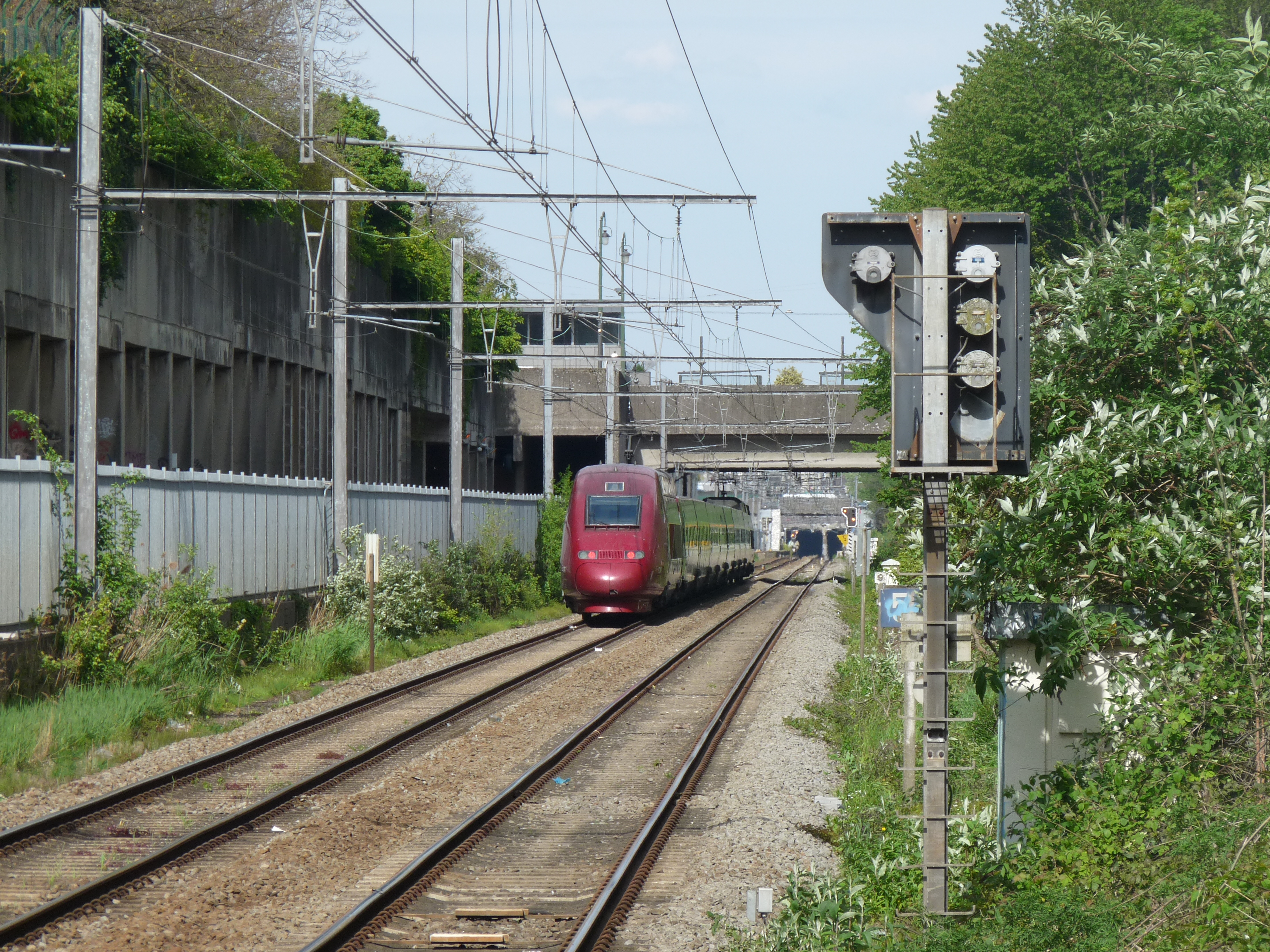 Omgeleide Thalystrein op de Westringspoor tijdens werkzaamheden op de Noord-Zuid verbinding